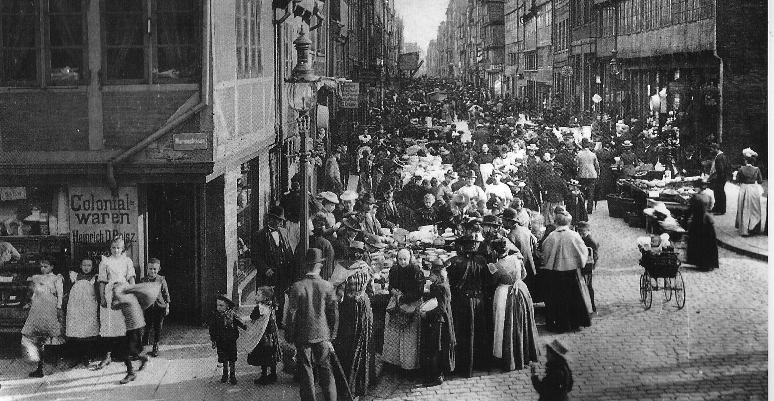 Die sogenannte "Judenbörse" an der Elbstraße in Hamburg-Neustadt.